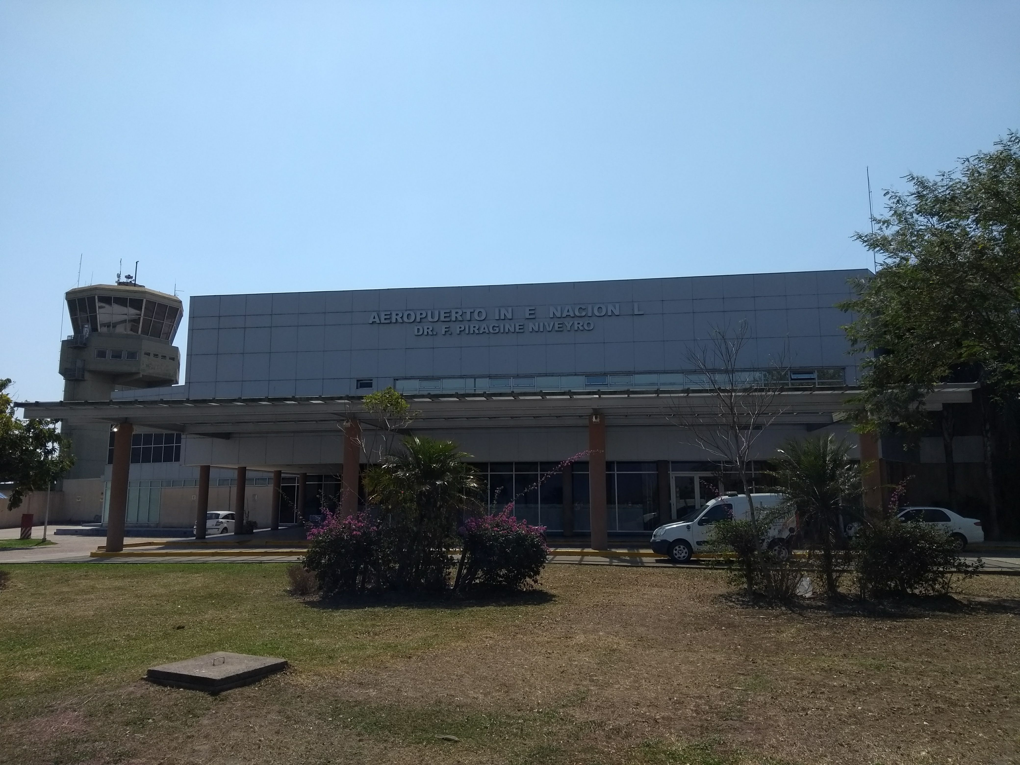 Sala de espera y torre de control en el aeropuerto Doctor Piragine Niveyro.